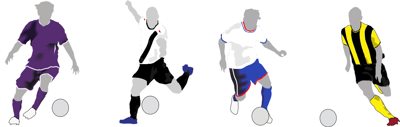 Dibujo de futbolistas de Nacional y Peñarol (considerados los "grandes" del fútbol uruguayo), y de Defensor Sporting y Danubio (considerados como "medianos"). De izquierda a derecha, jugador de Defensor Sporting, Danubio, Nacional y Peñarol.